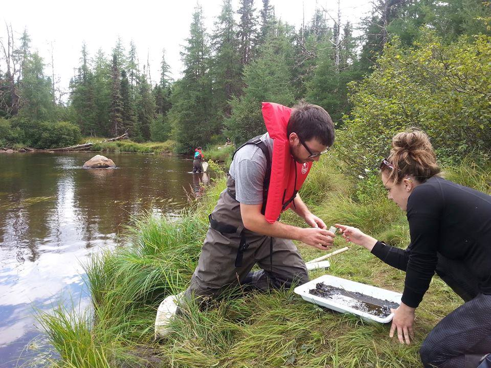 Alex Tyrrell participates in Dr. Jean-Philippe Lessard’s field ecology course at Concordia University in August 2015.